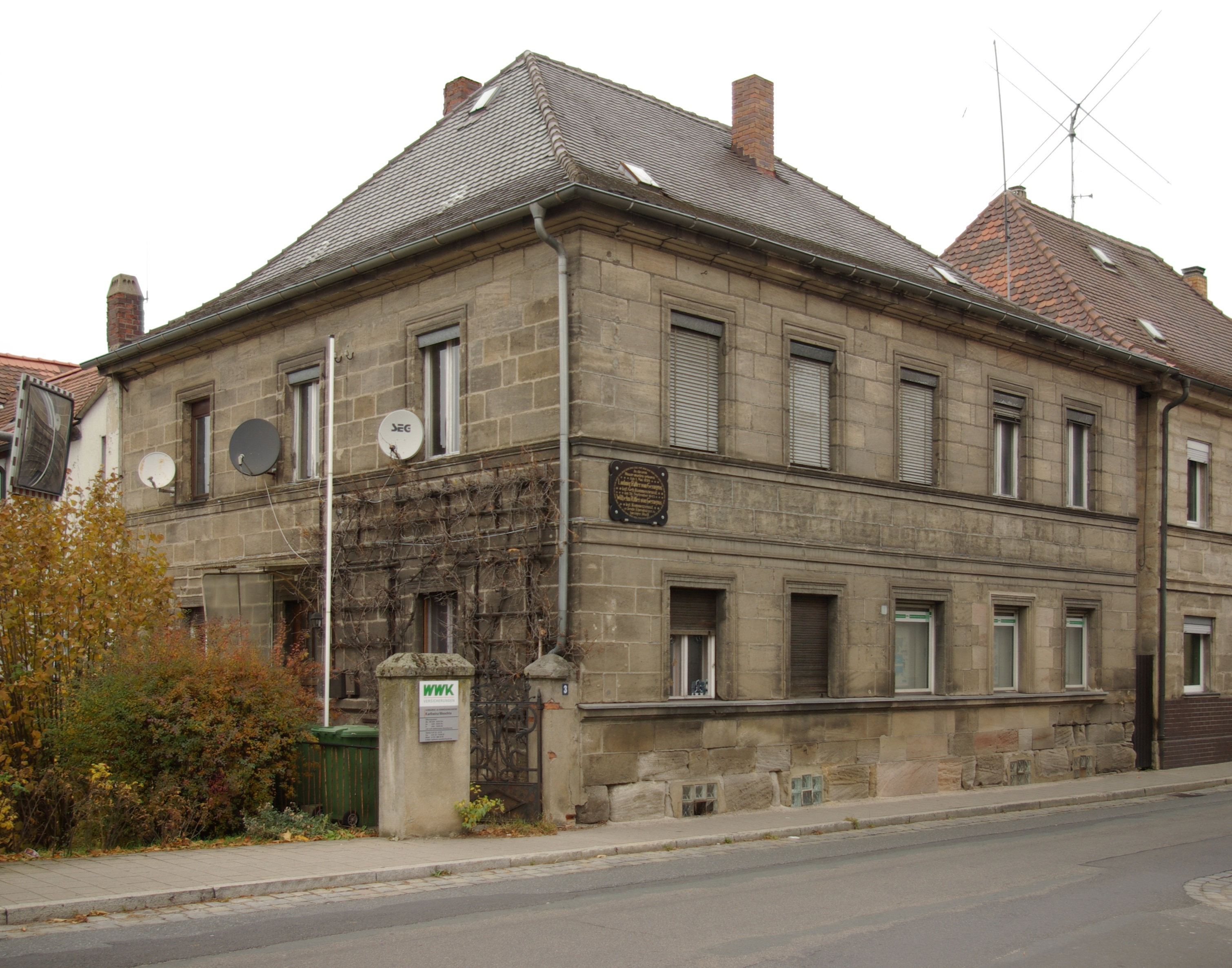 Baiersdorf. Geburtshaus von Ludwig von Gerngros in der Forchheimer Straße 3.